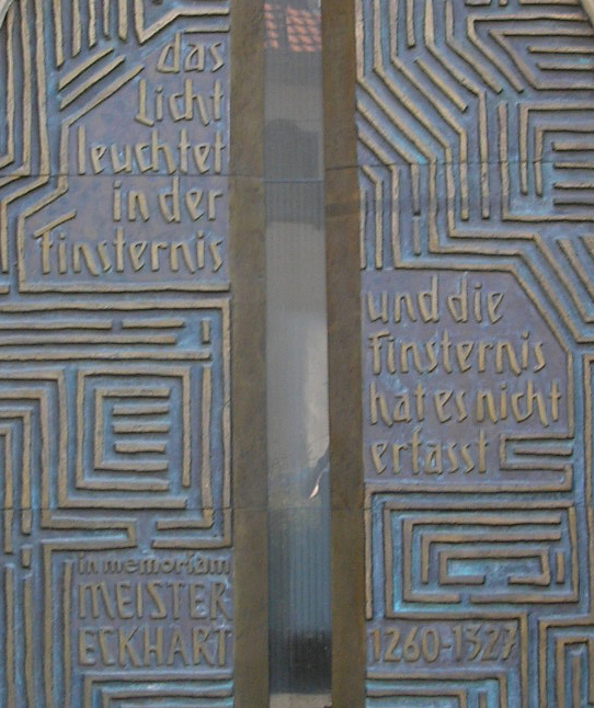 Das Meister-Eckart-Portal an der Predigerkirche in Erfurt, Relief von Siegfried Krepp